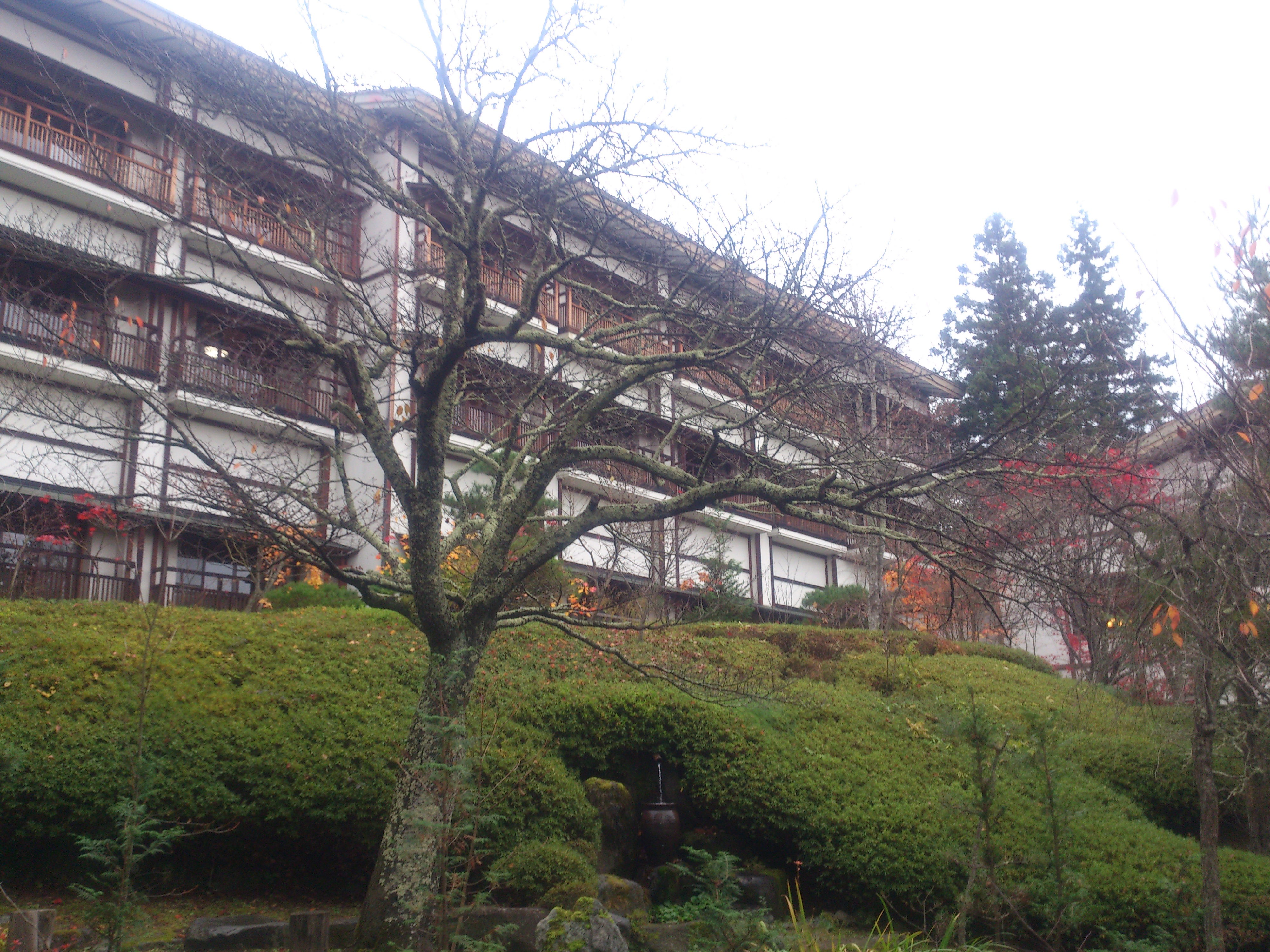 上林ホテル仙壽閣 本館を「沢蟹と清流の庭園」から